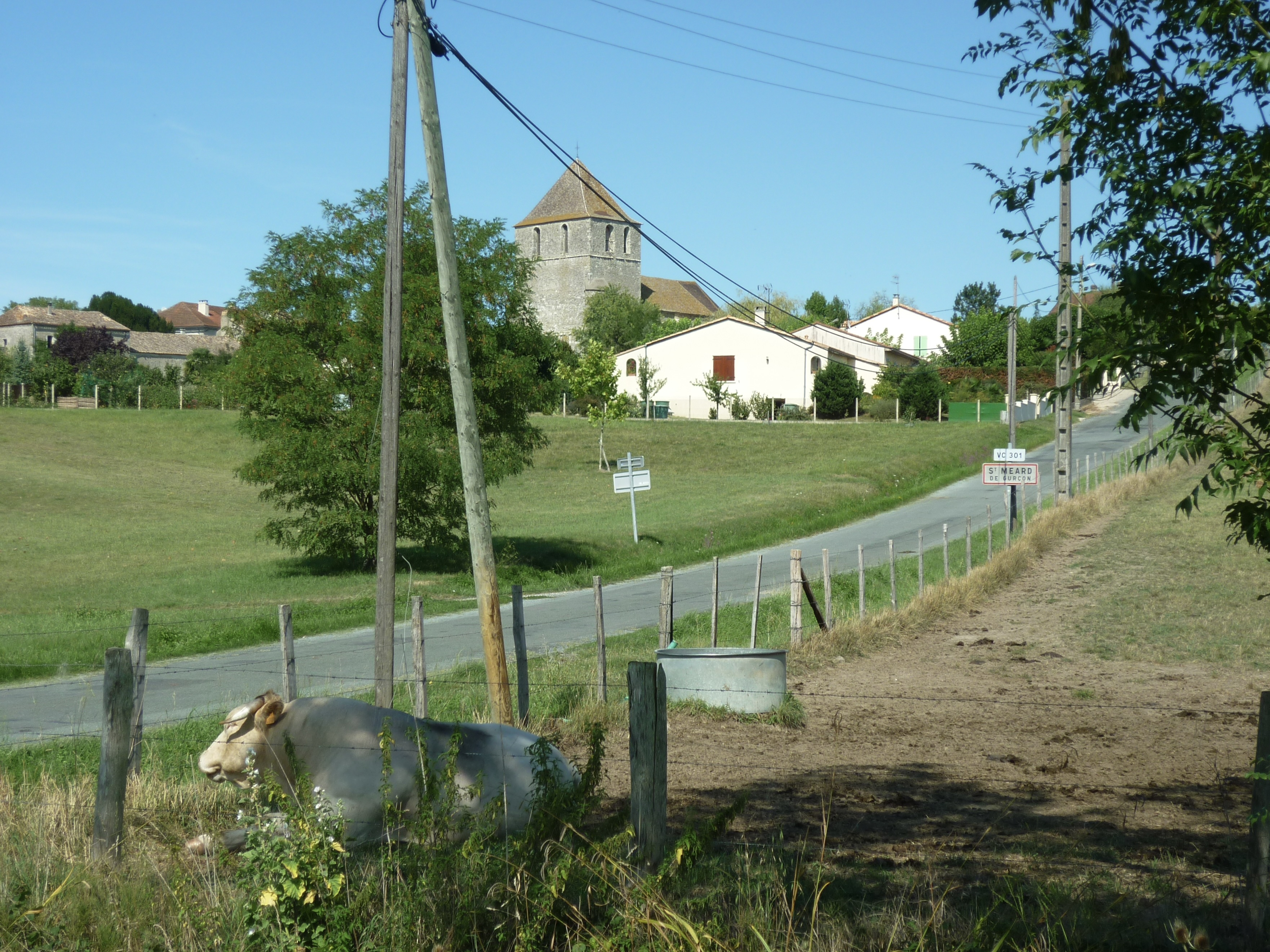 Vue de Saint-Méard-de-Gurçon (Dordogne).